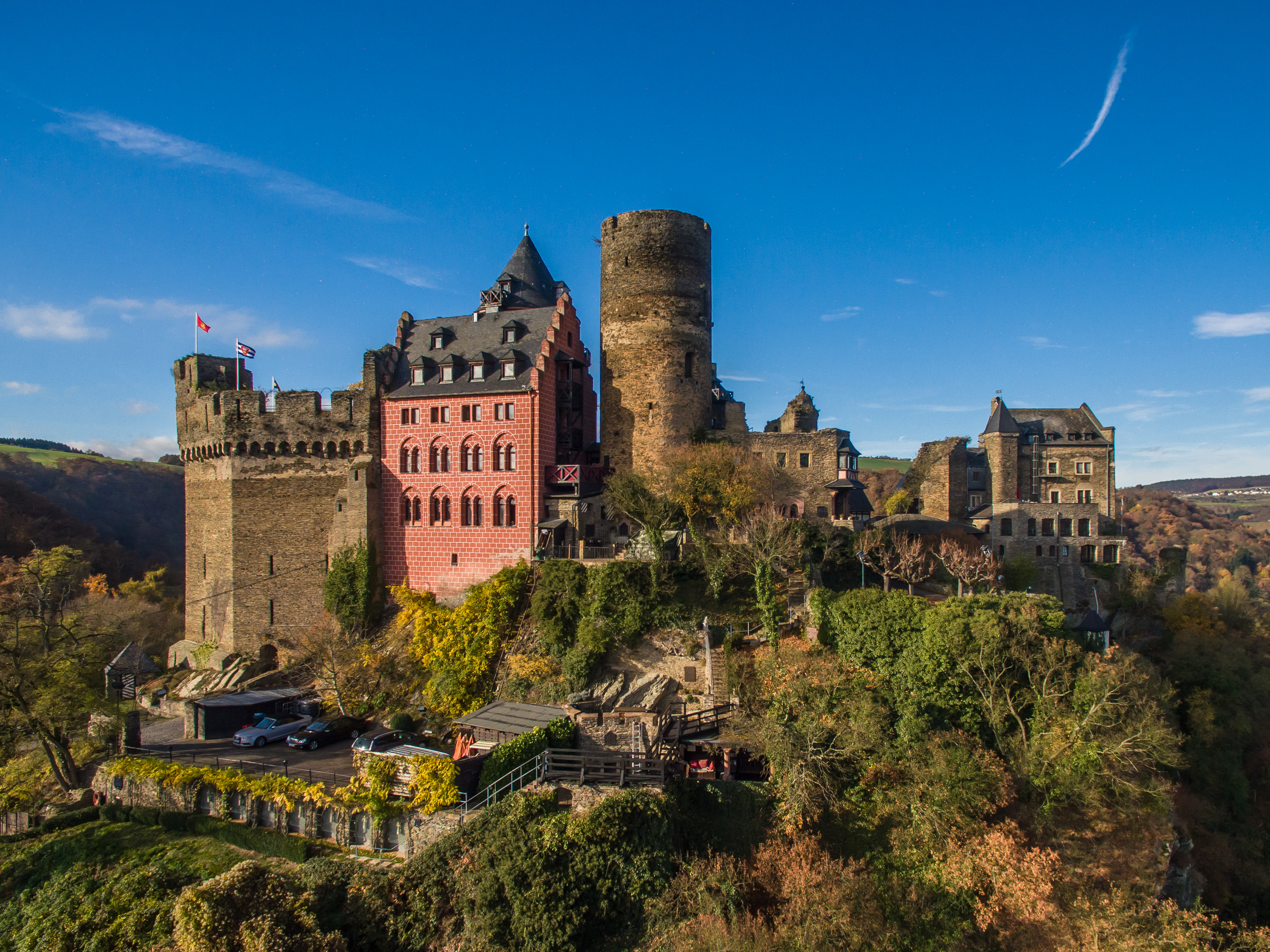 Schönburg in Oberwesel